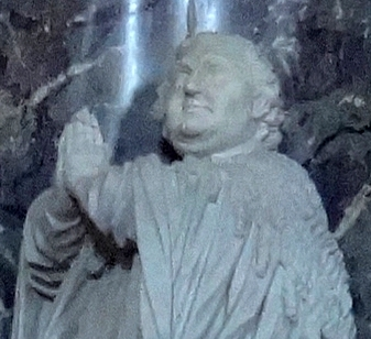 Bernhard Goeken, Detail des Grabmals in der Stiftskirche St. Georg, Goslar-Grauhof